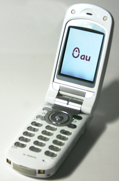 A5306ST_Japan